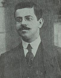 Joseph Brami, Jewish-Tunisian Journalist and Zionist activist